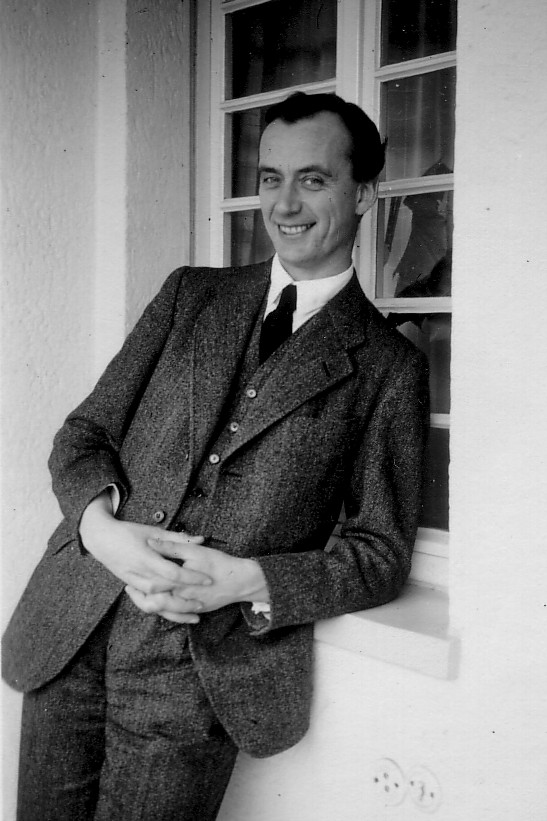 Heinrich Bartmann 1935